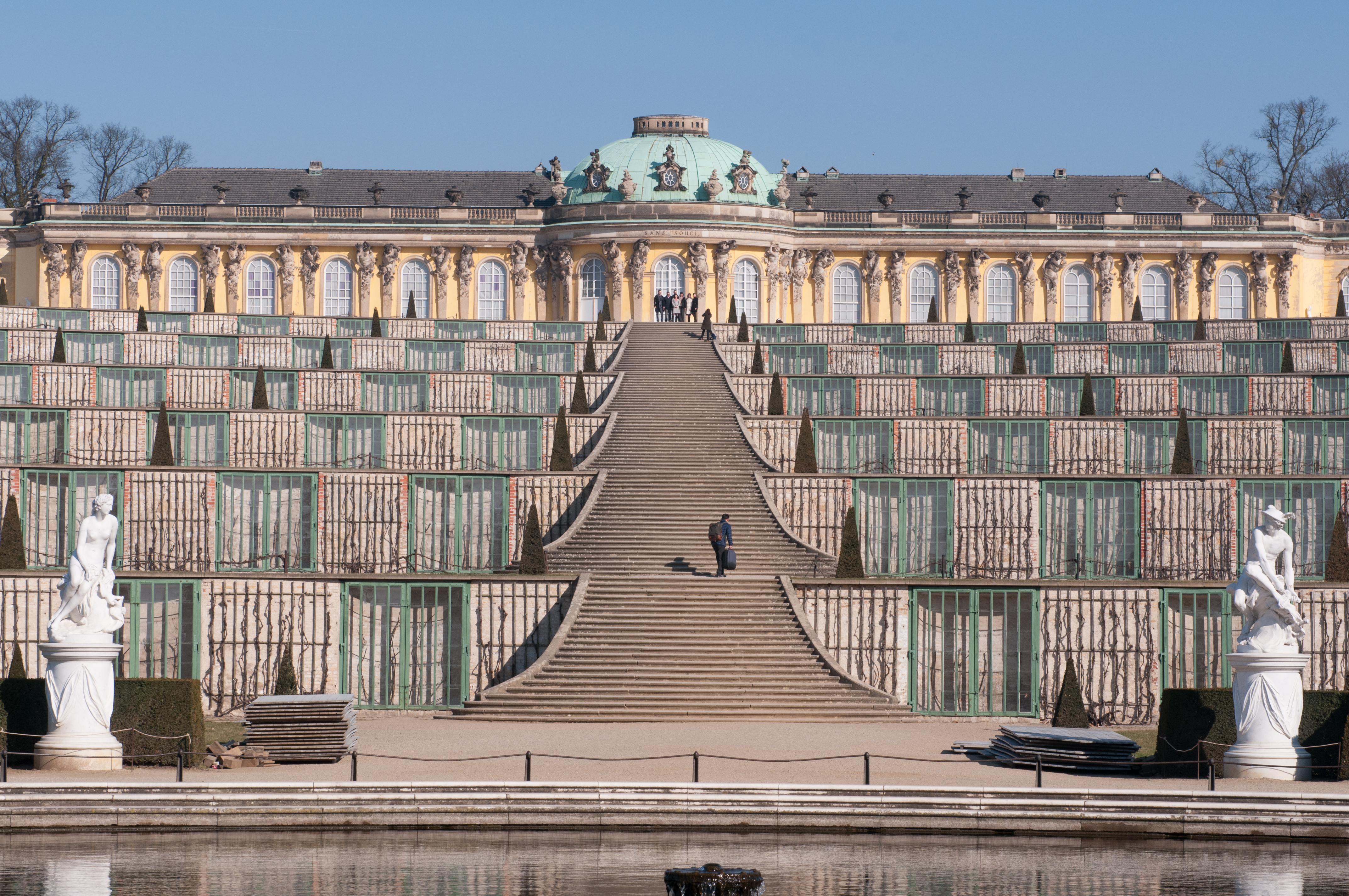 Garten und Schloss Sanssouci V ZR 14/12